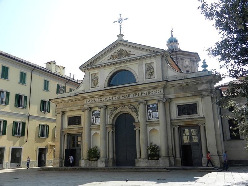 Varese - Basilica di S. Vittore